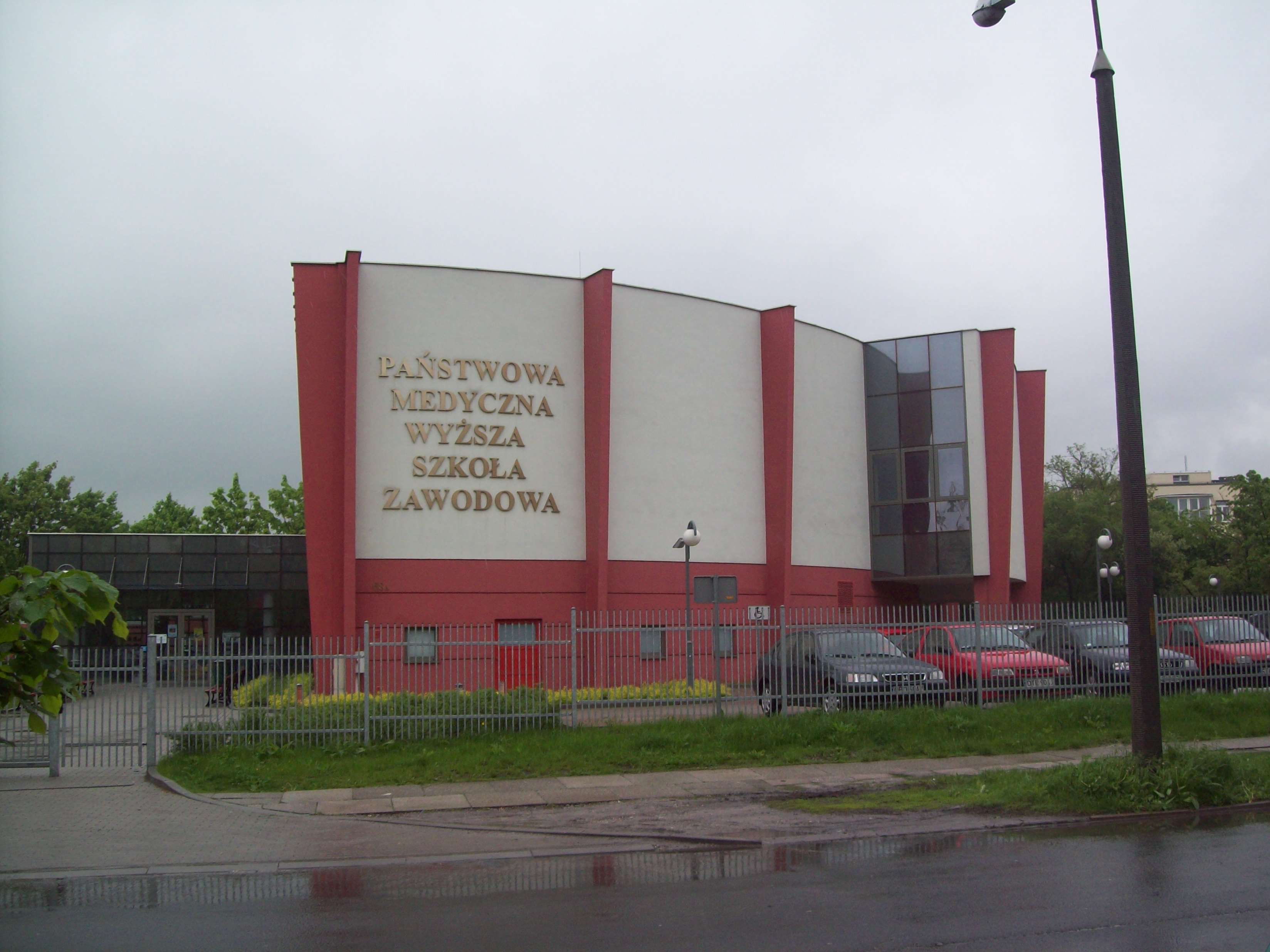 Państwowa Medyczna Wyższa Szkoła Zawodowa w Opolu